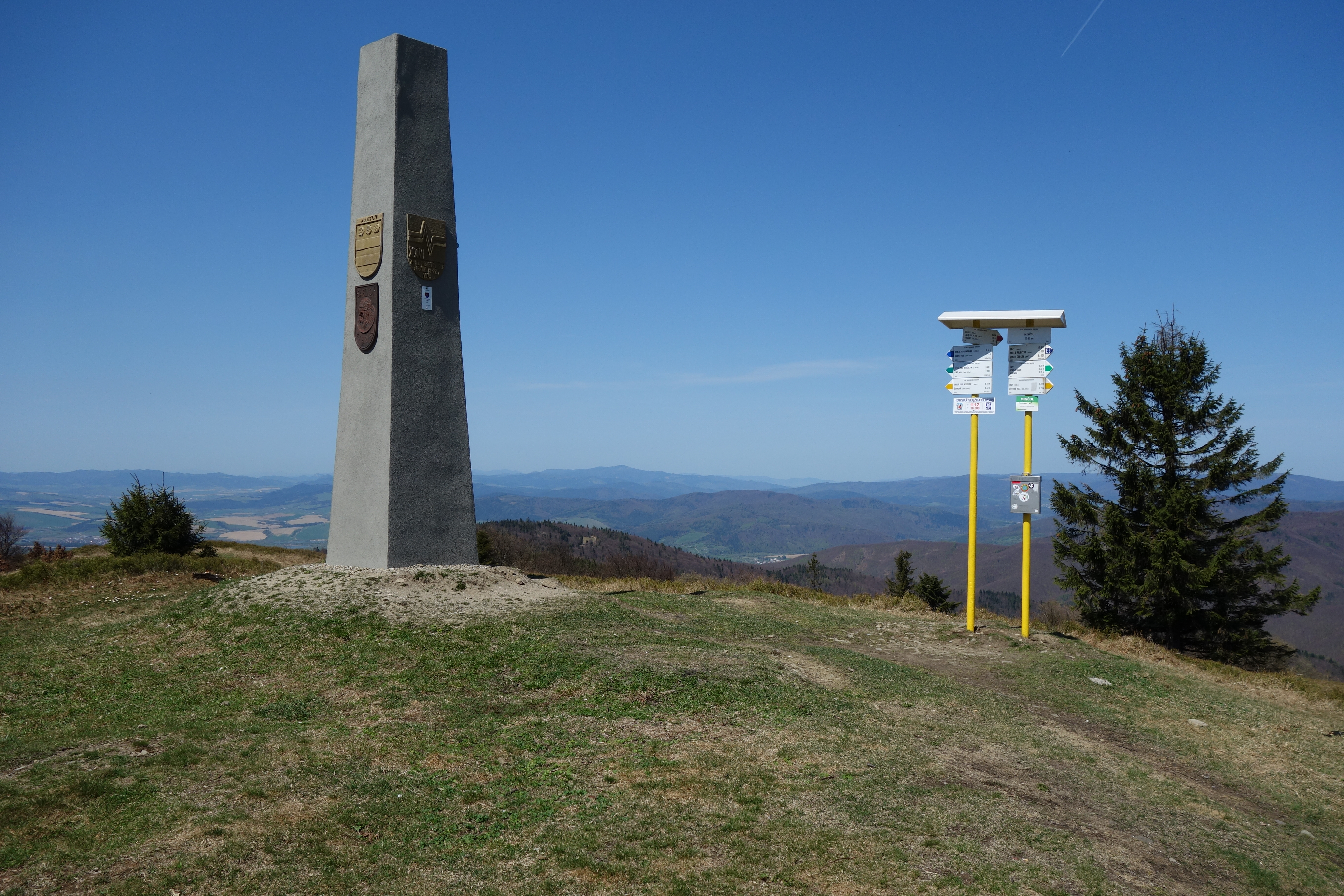 Vrchol Minčola s pylónom a turistickým smerovníkom This is a photography of Natura 2000 protected area with ID SKUEV0331